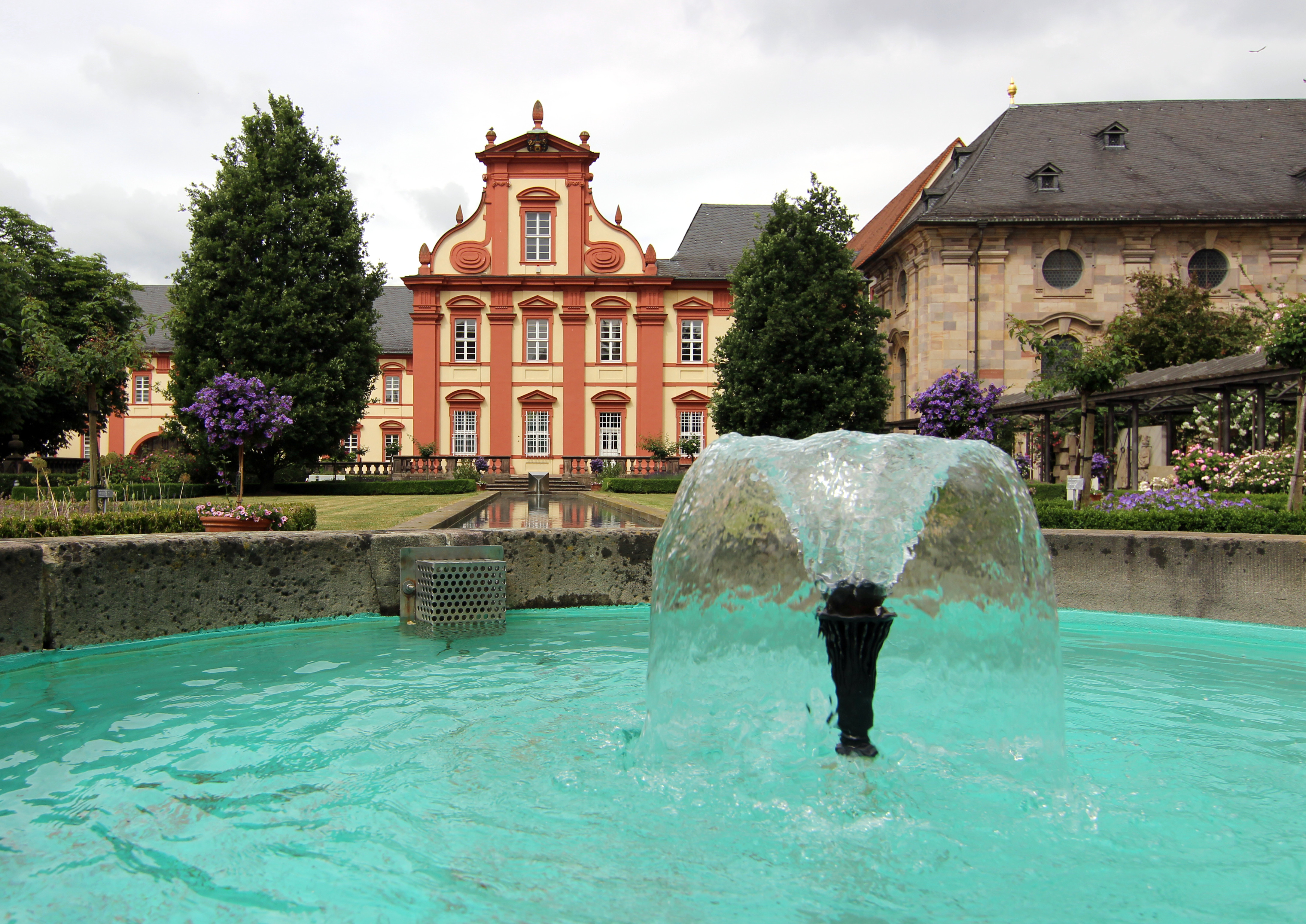 Dechaneigarten in Fulda